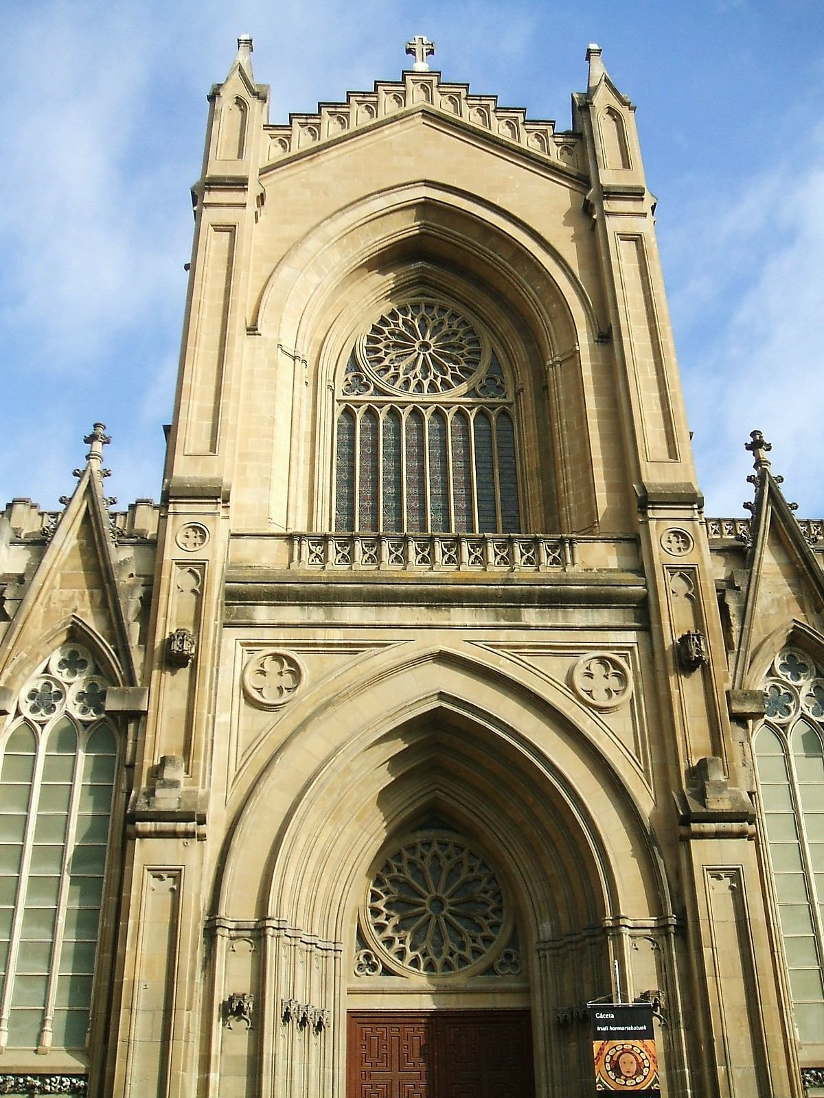 Fachada meridional de la nave transvesal de la Catedral Nueva de Vitoria-Gasteiz